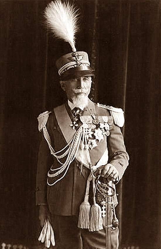 Il generale e gerarca fascista Emilio De Bono. Fotografia di F. Murie, Tripoli, gennaio 1929.